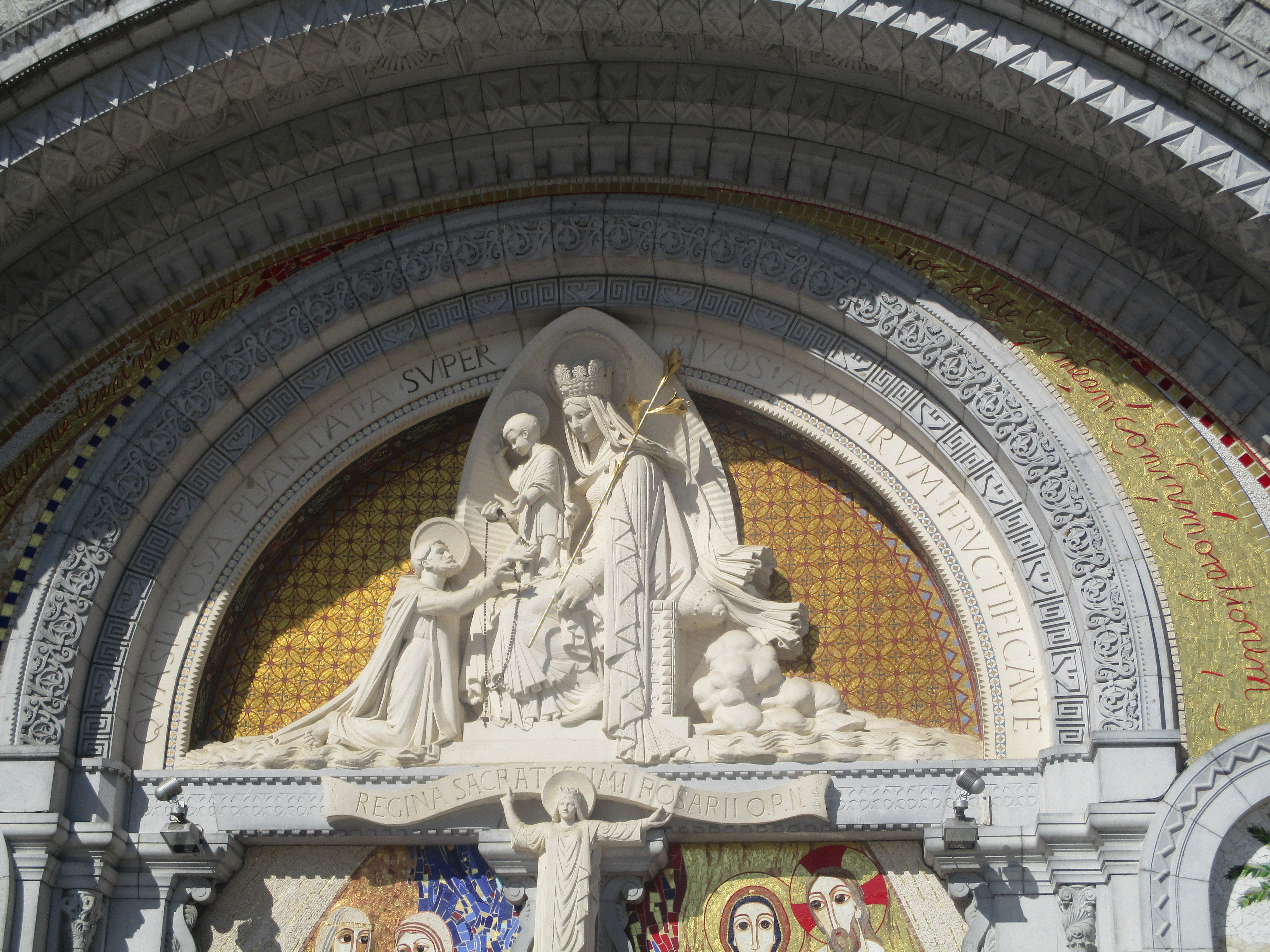 Lourdes ː tympan de la basilique ND du Rosaire.